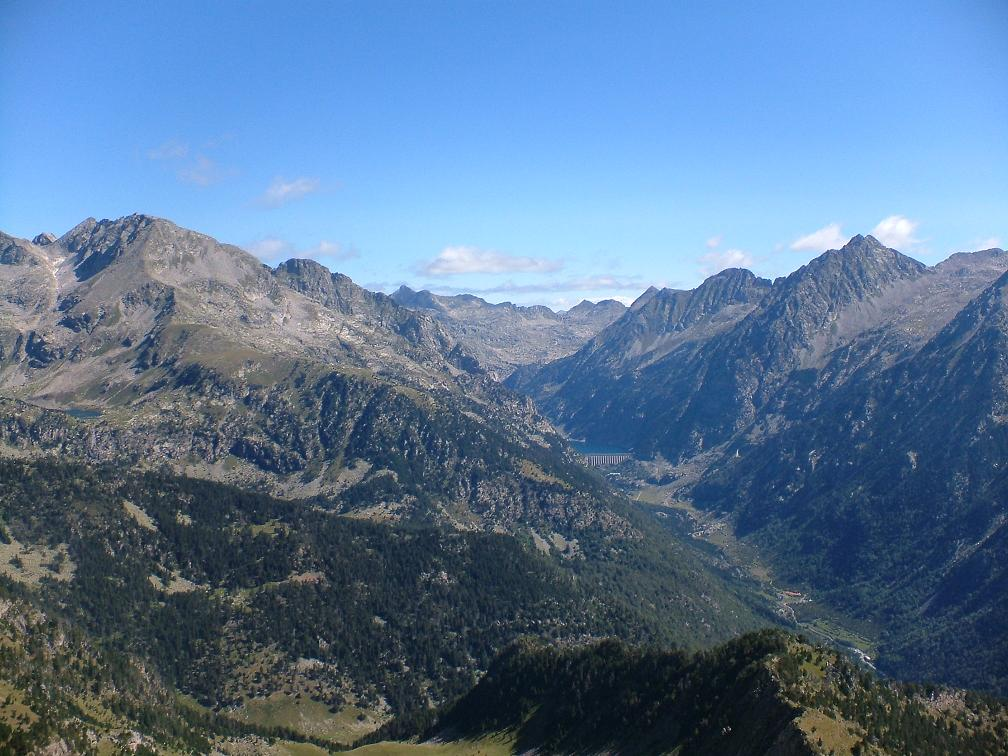 Capçalera de Caldes vista des de l'Aüt; la Vall de Boí, Alta Ribagorça, Catalunya